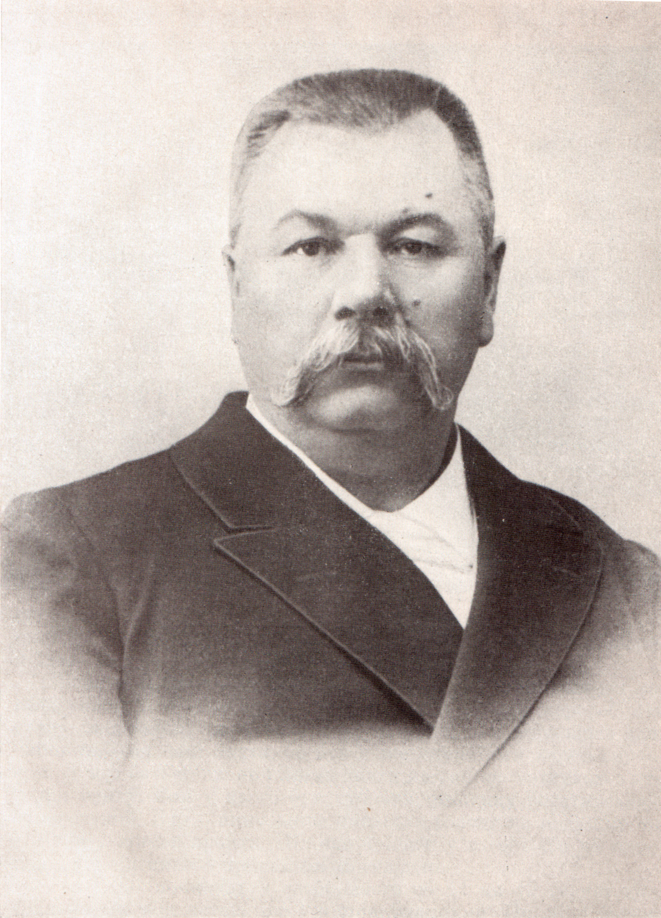 Фото Марка Кропивницького 1898 року.